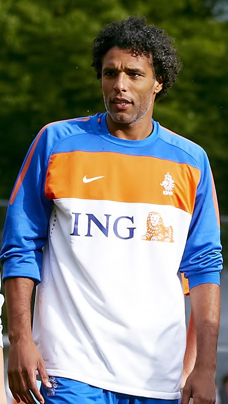 Pierre van Hooijdonk tijdens de ING Ballenjongens en -meiden Selectiedag bij Spartaan ‘20 in Rotterdam op 31 augustus 2012.